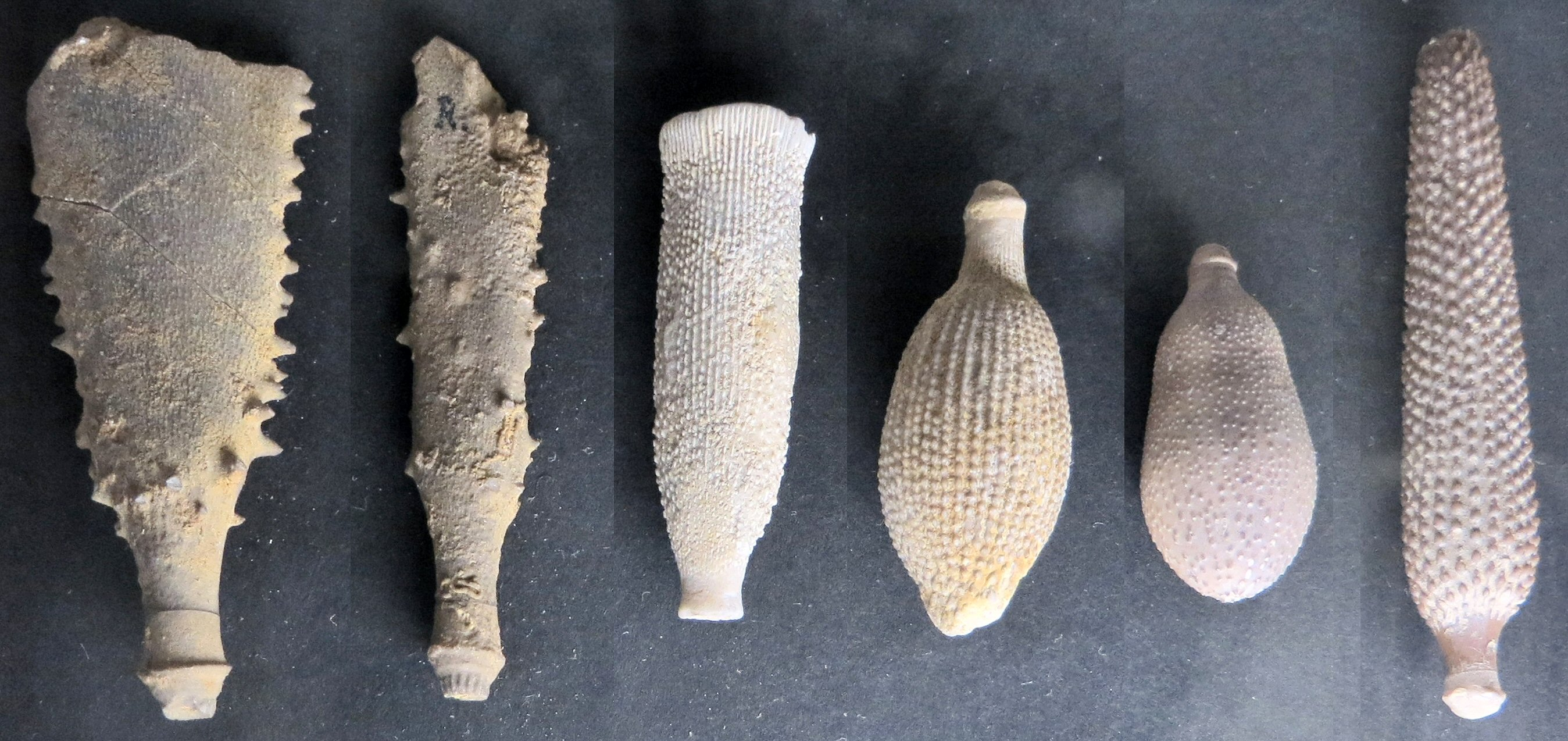 Radioles de Cidaridae (différentes espèces, MNHN).